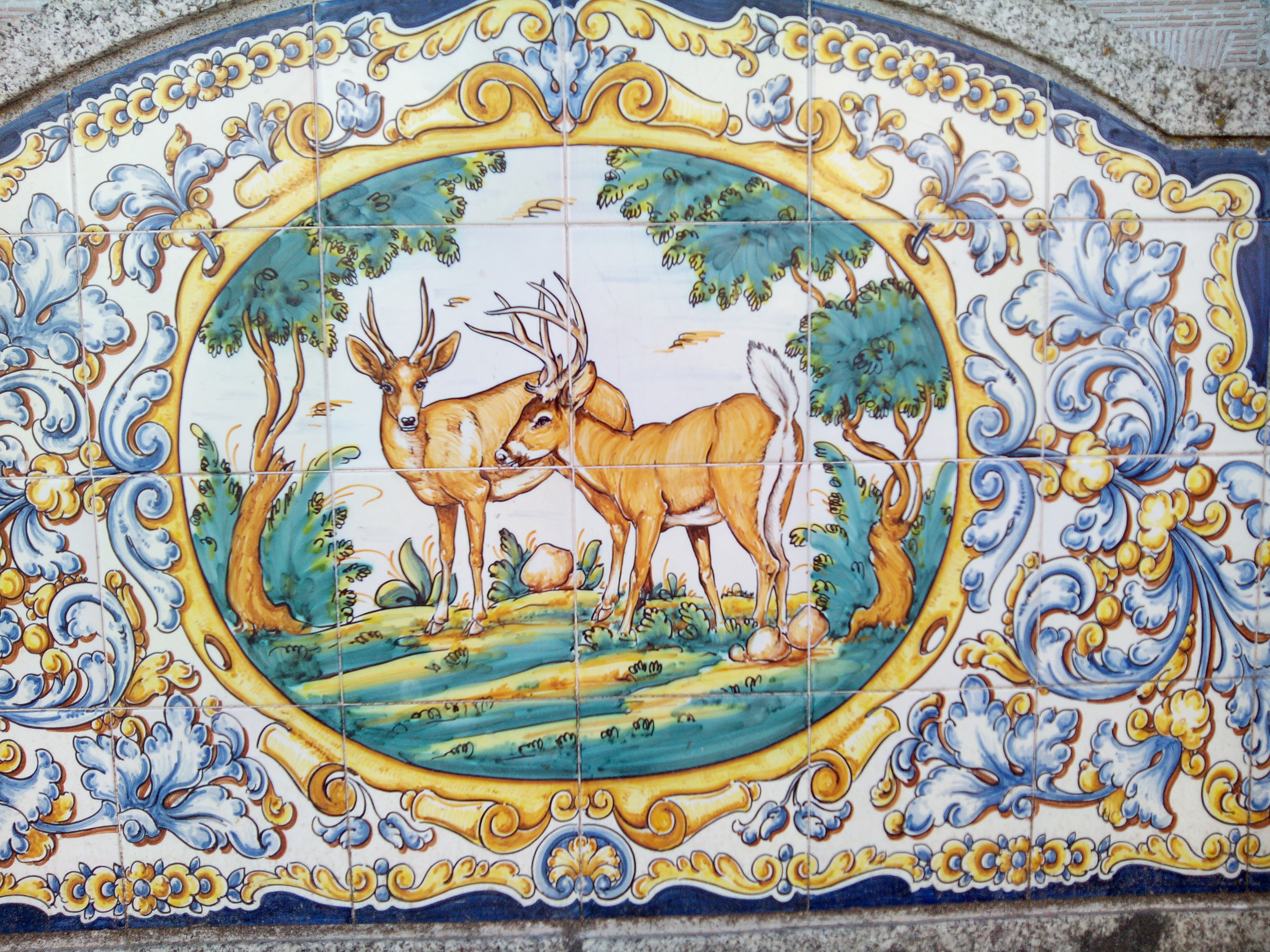 Muestra de cerámica de la Plaza de España de Puente del Arzobispo. Toledo (España).